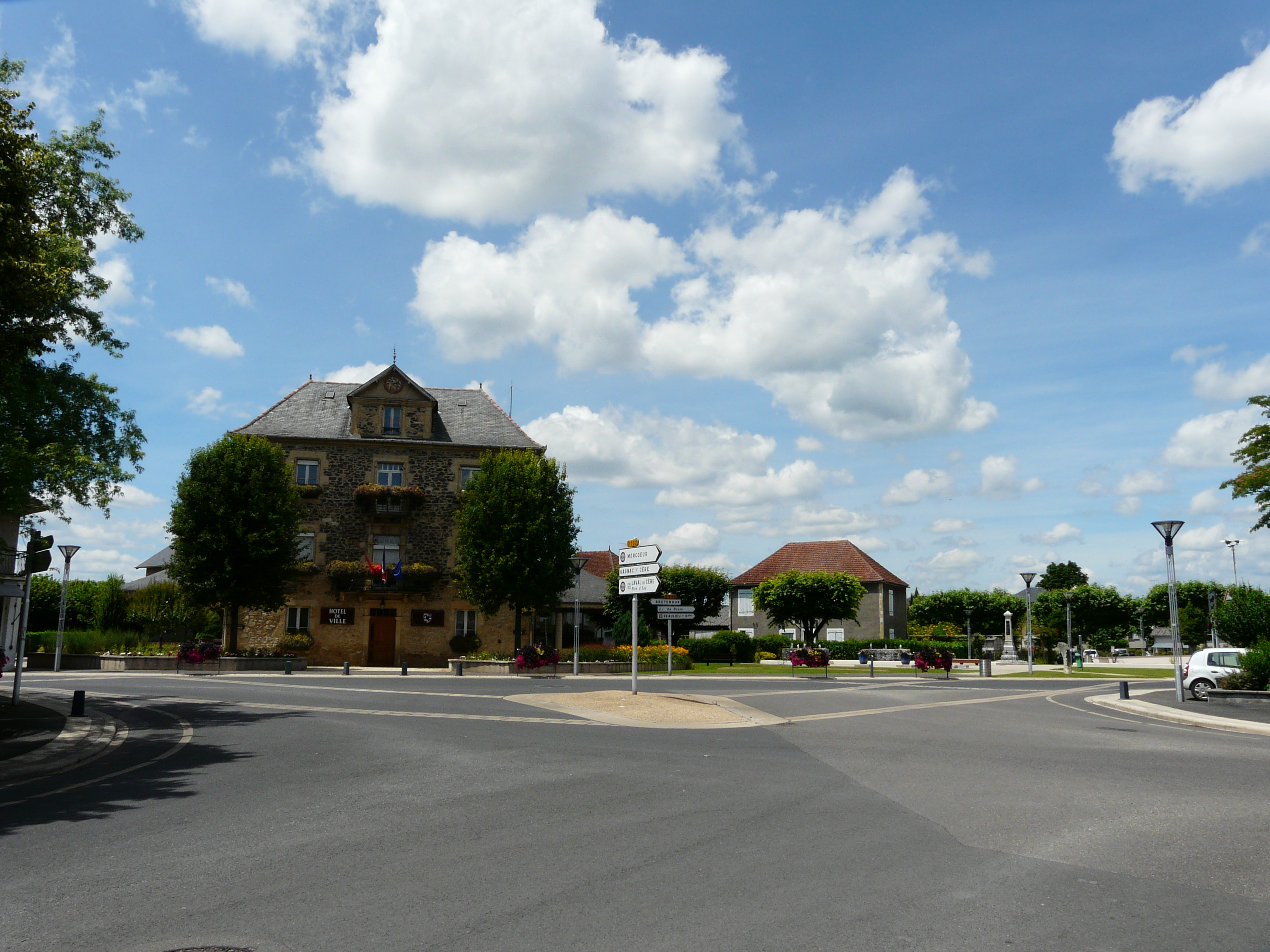 La mairie au carrefour des routes départementales 102 et 940, Biars-sur-Cère, Lot, France.